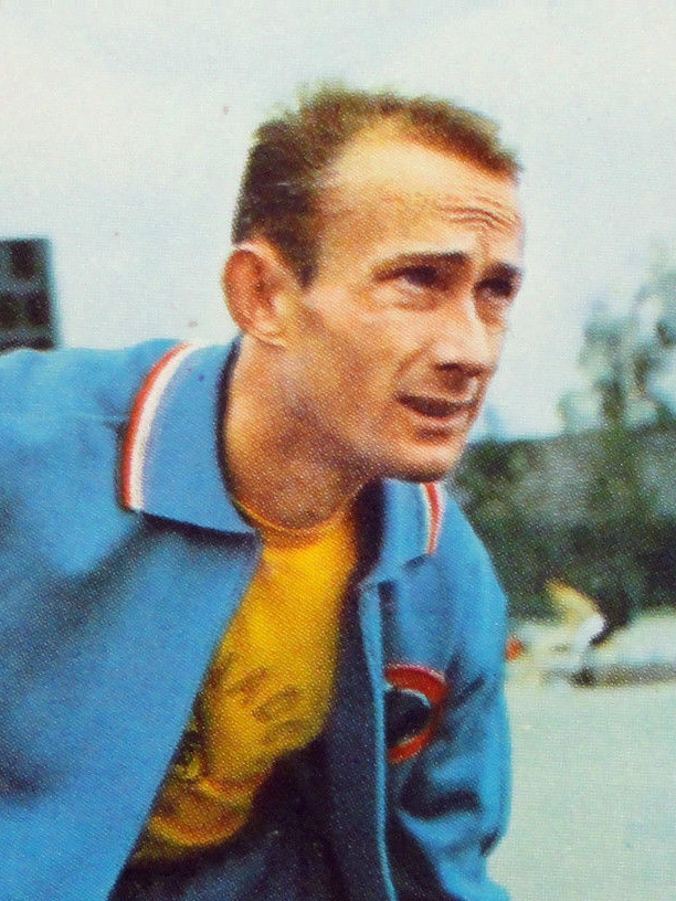 CAMPIONI DELLO SPORT 1969/70-n.39-WADOUX (FRA)-ATLETICA LEGG